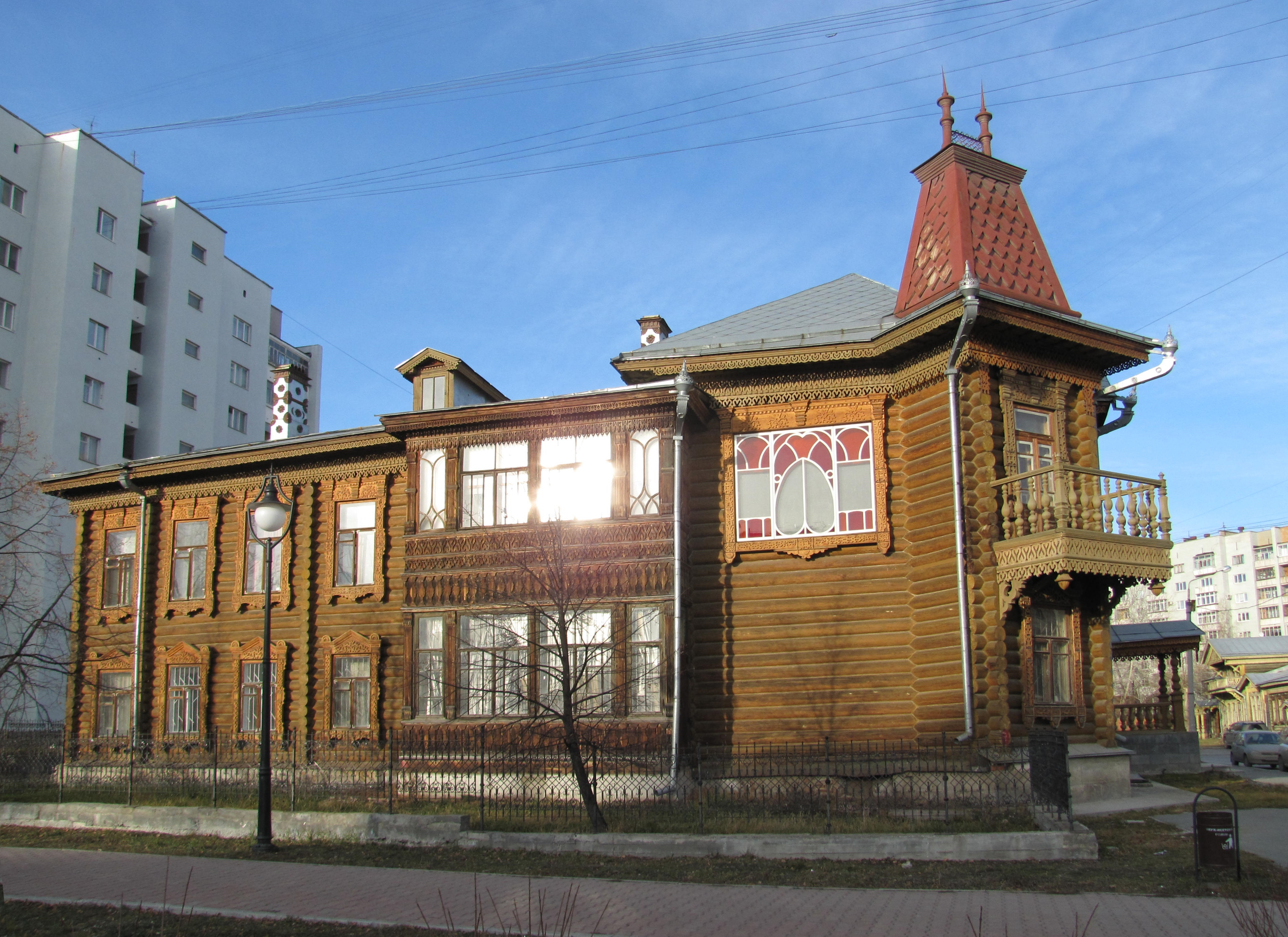 Главный дом купеческой усадьбы с лепниной в интерьере (Свердловская область, Екатеринбург, сакко и ванцетти улица, 28)